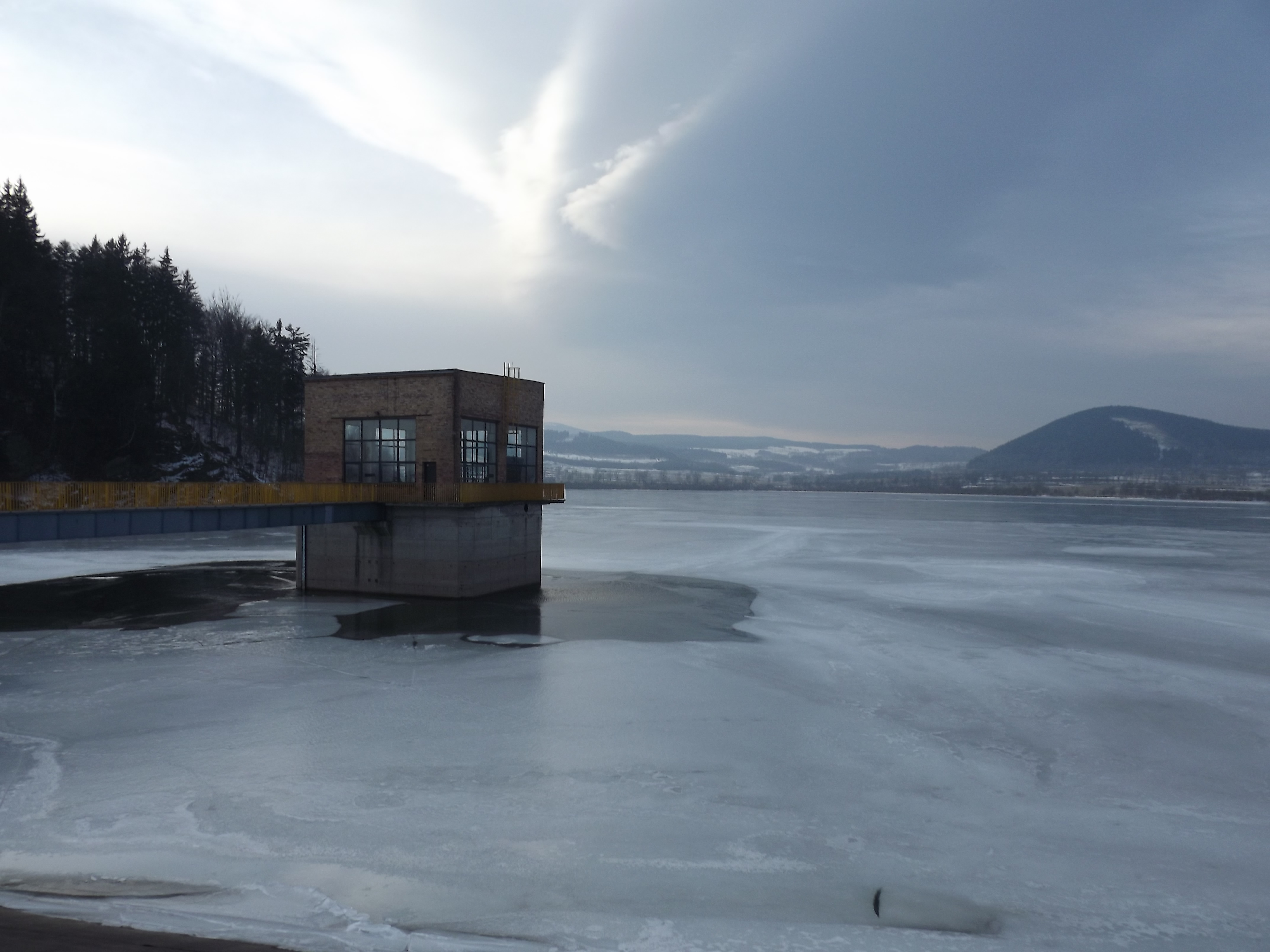 Zbiornik w Bukówce